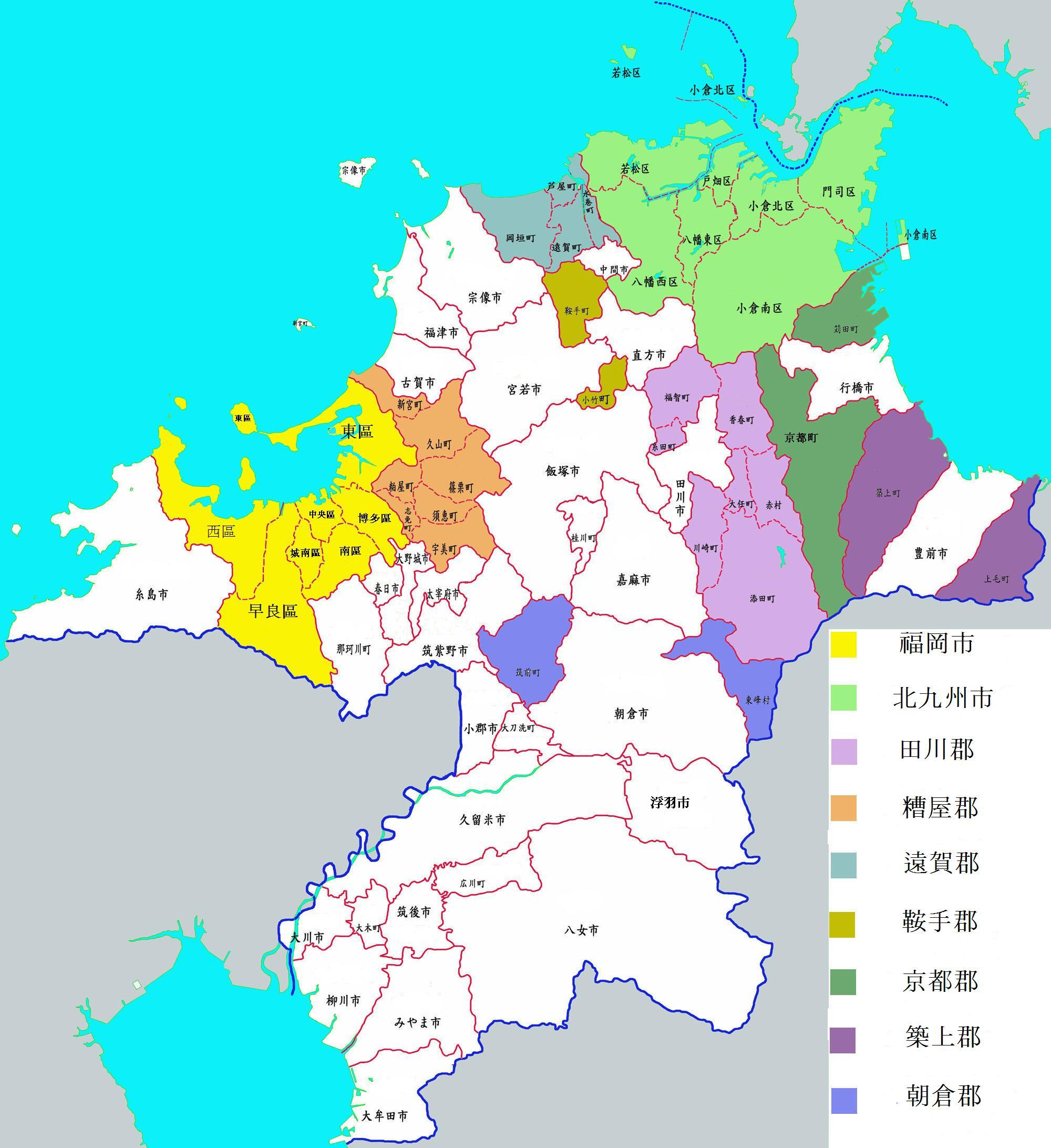 粵語: 據韓文版公有領域圖像改出來。